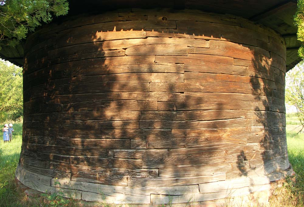 Altarul rotund al bisericii de lemn din Nicoleşti, Mureş.